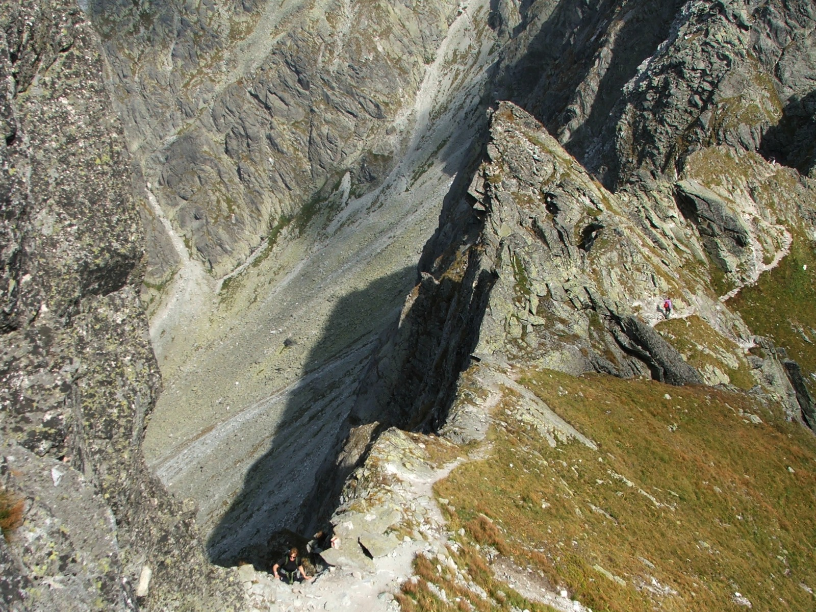 Turnia w grani Orlej Perci (po zachodniej stronie Wielkiej Buczynowej Turni)